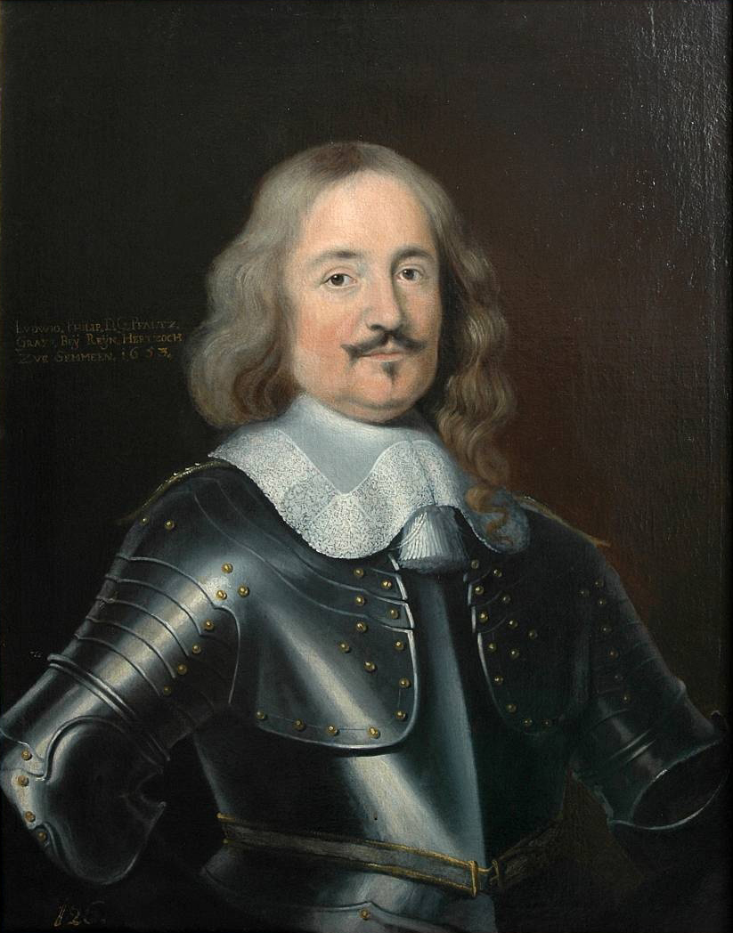 Herzog Ludwig Philipp von Pfalz-Simmern, Pfalzgraf bei Rhein